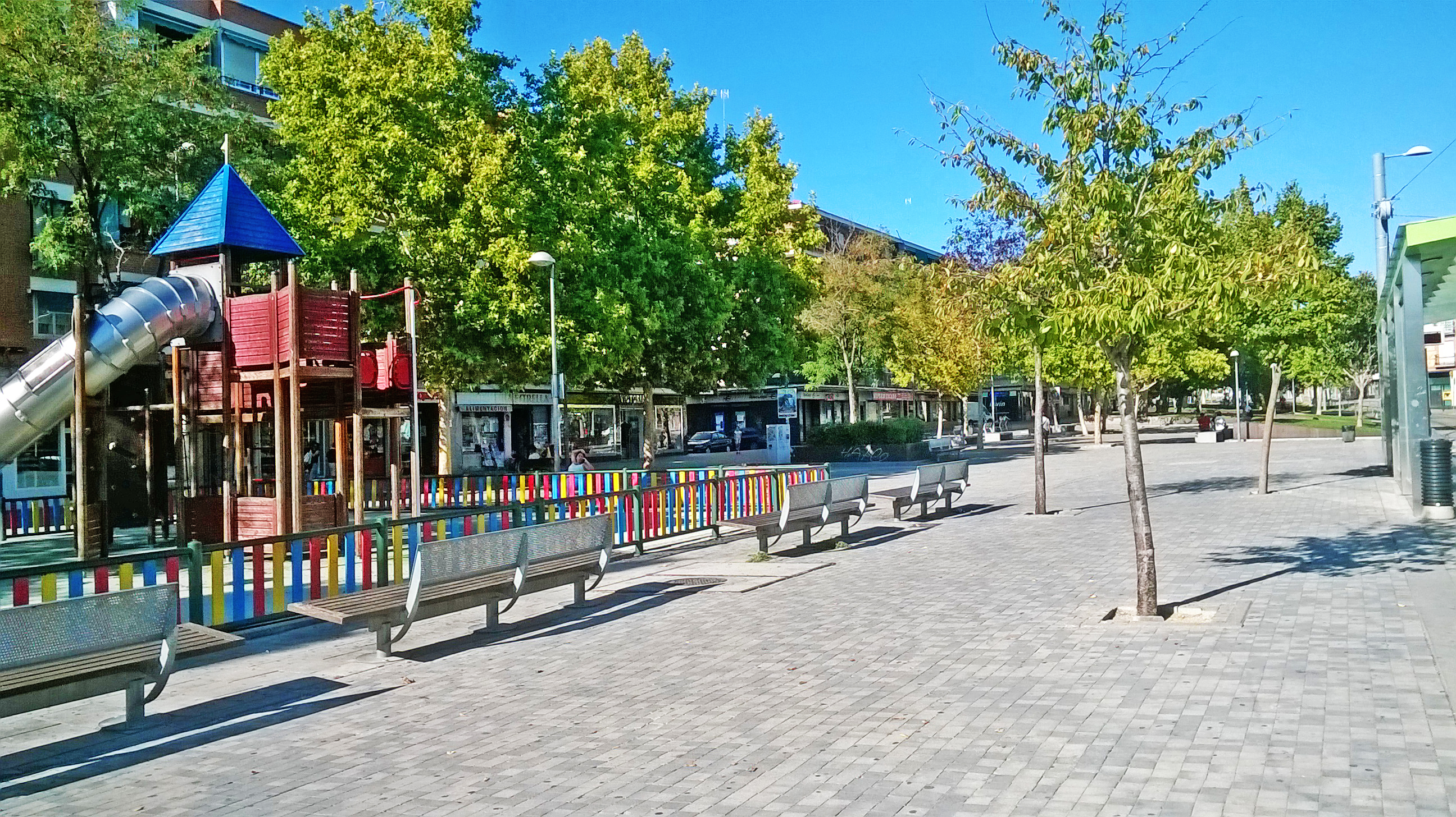 El Bulevar Sur, esta construido donde antiguamente pasaba la carretera de Toledo, y que en los siglos pasados fue el camino real de Toledo a Madrid